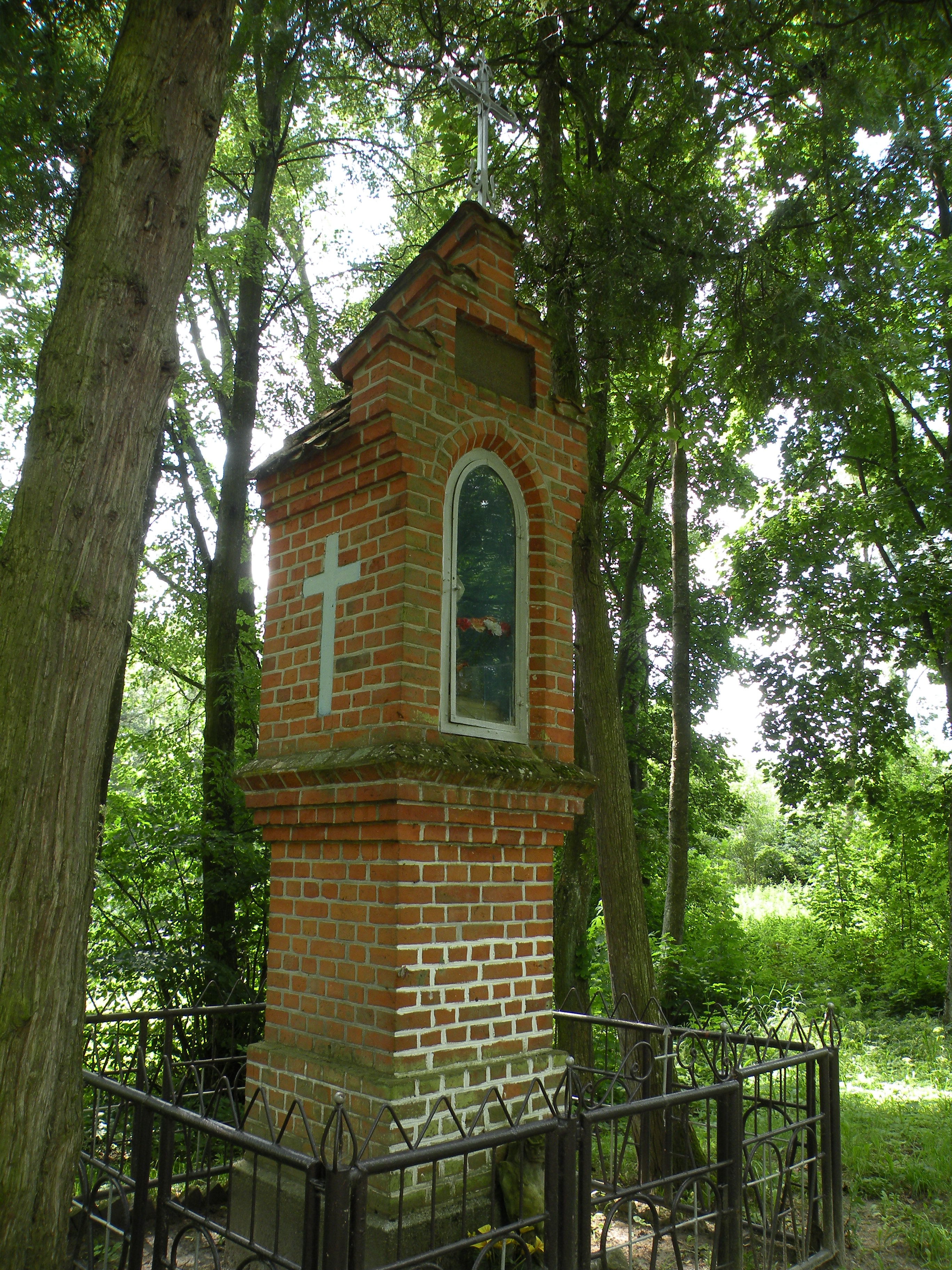 Kapliczka w Potrytach nad rzeką Symsarną przy brukowanej drodze